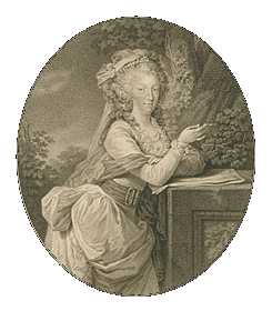 Kaiserin Maria Theresa von Neapel-Sizilien (1772-1807)